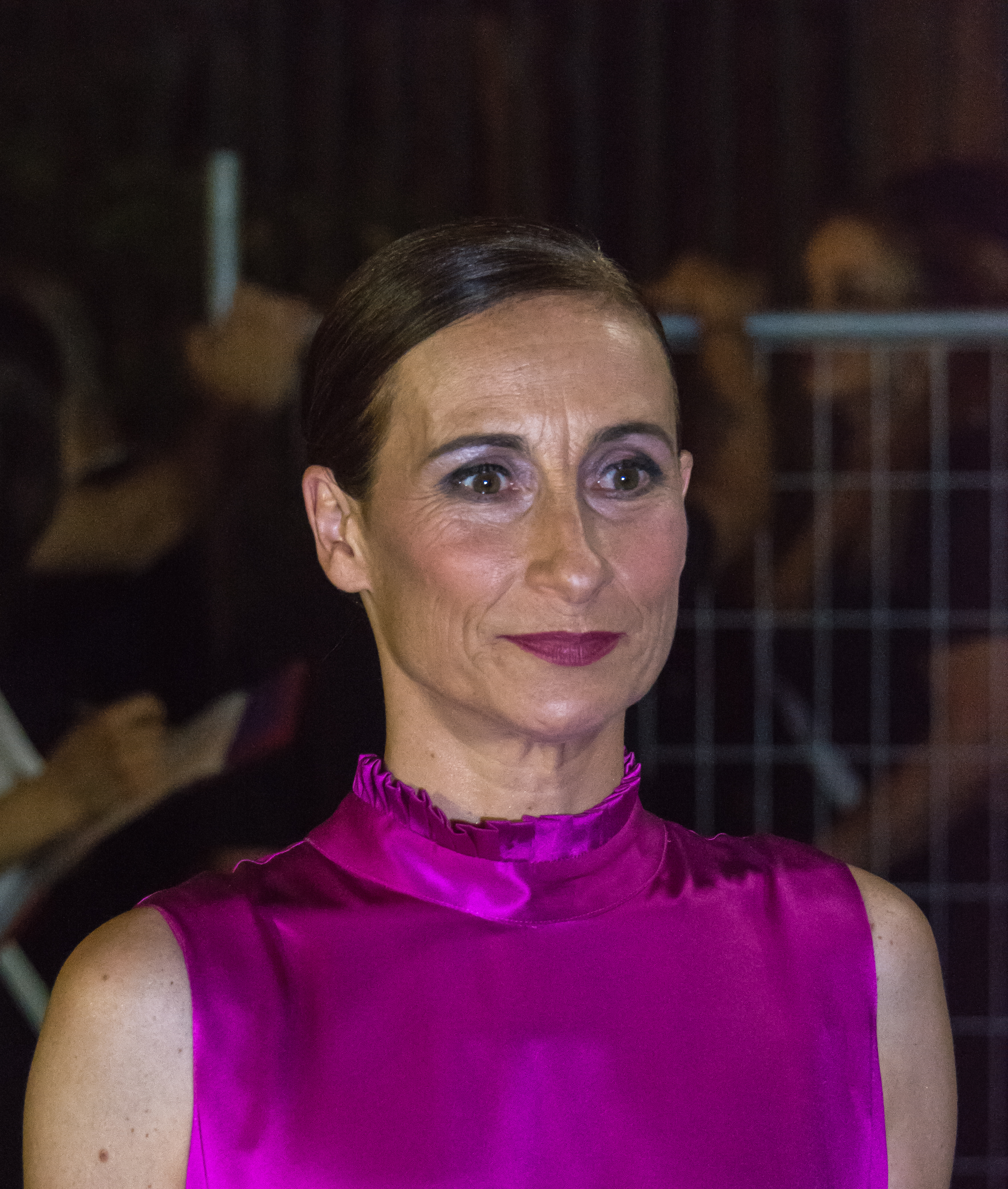 Amparo Noguera, Premios Caleuche, Teatro Oriente, Providencia, Santiago, Región Metropolitana de Santiago, Chile.